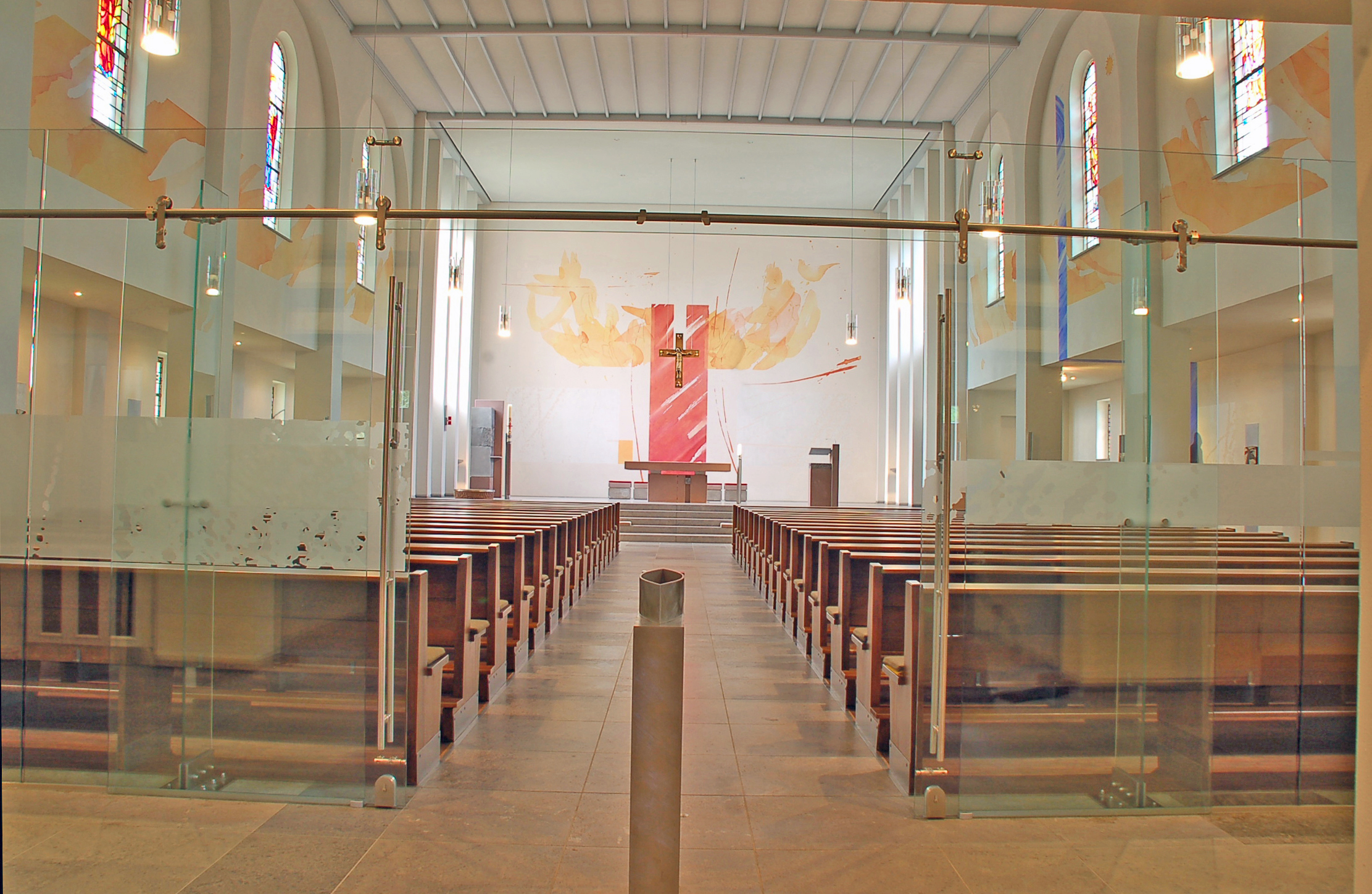 Blick in die 2003 renovierte Kirche